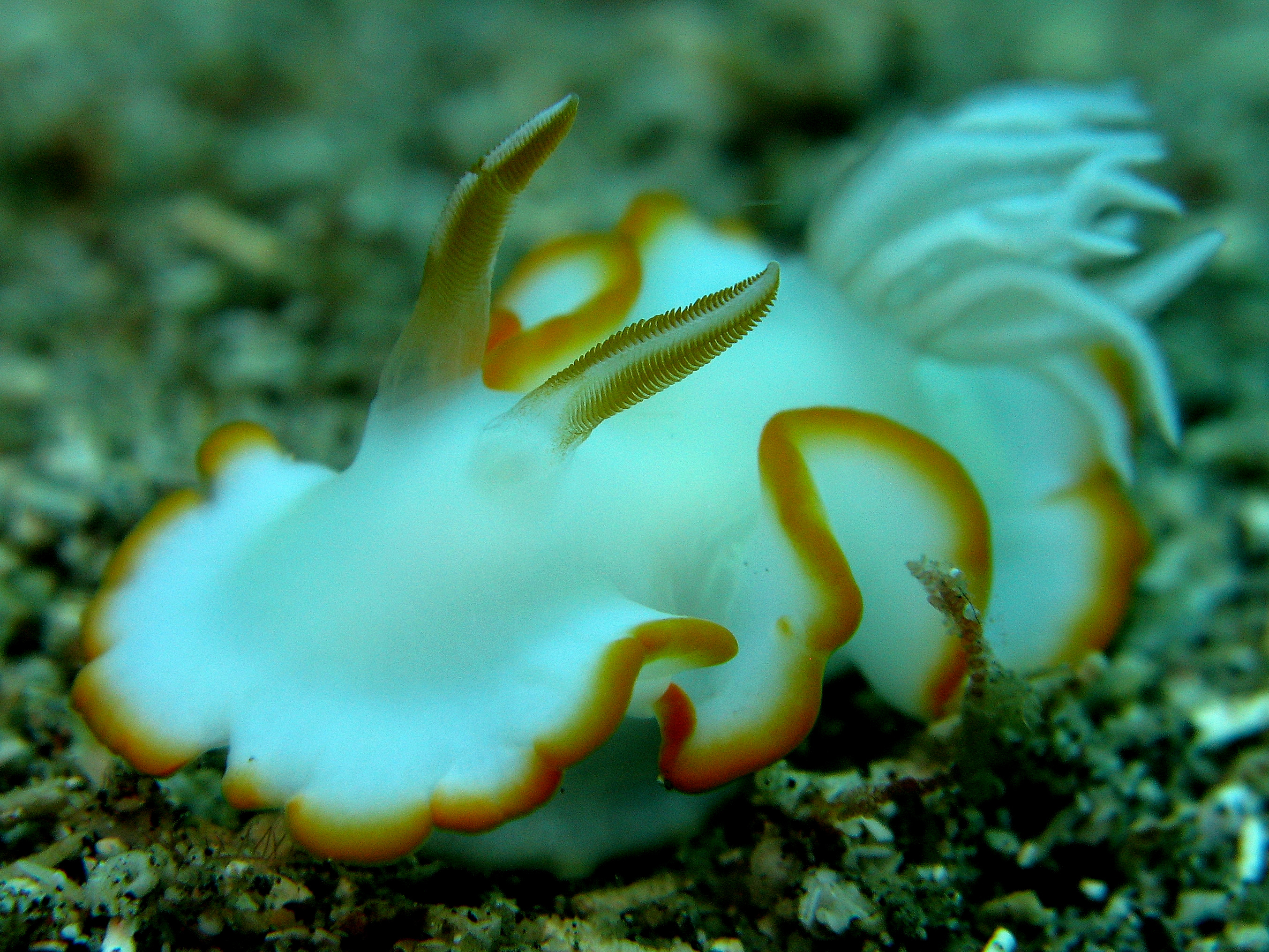 Ardeadoris electra (sinonimia: Glossodoris electra) en Lembeh, Indonesia